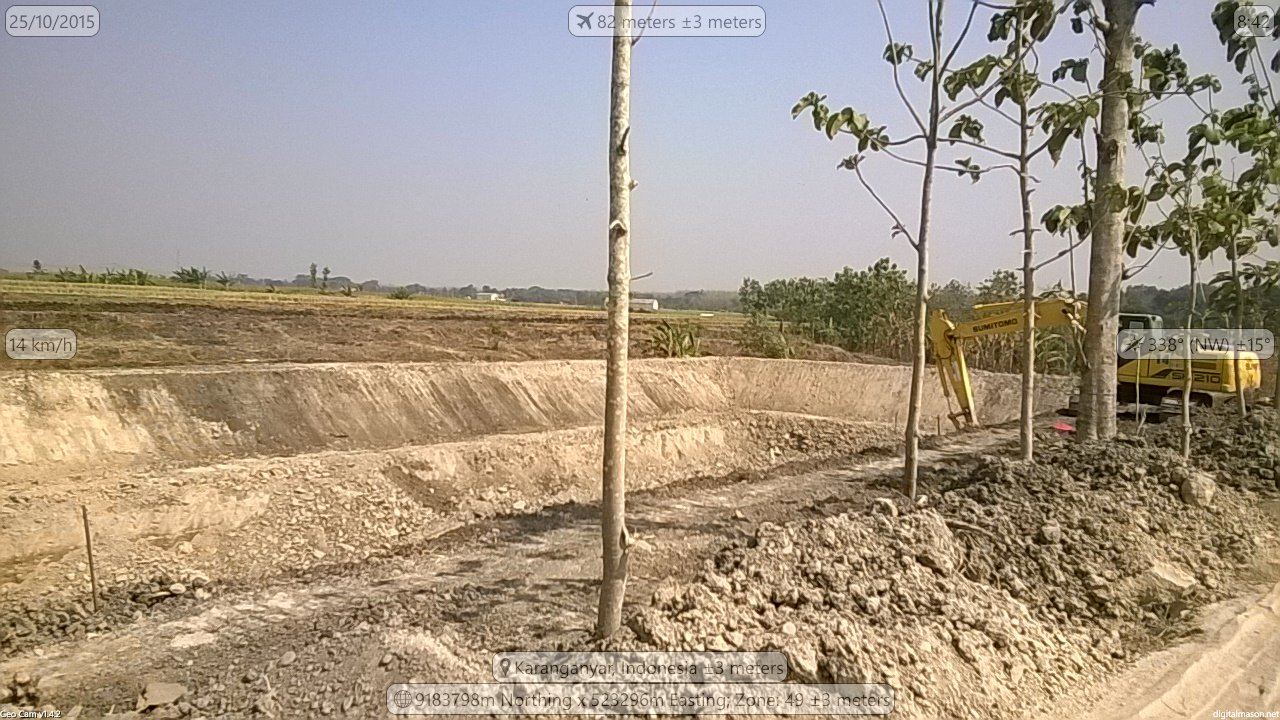 Prroses pembangunan embung Kauman